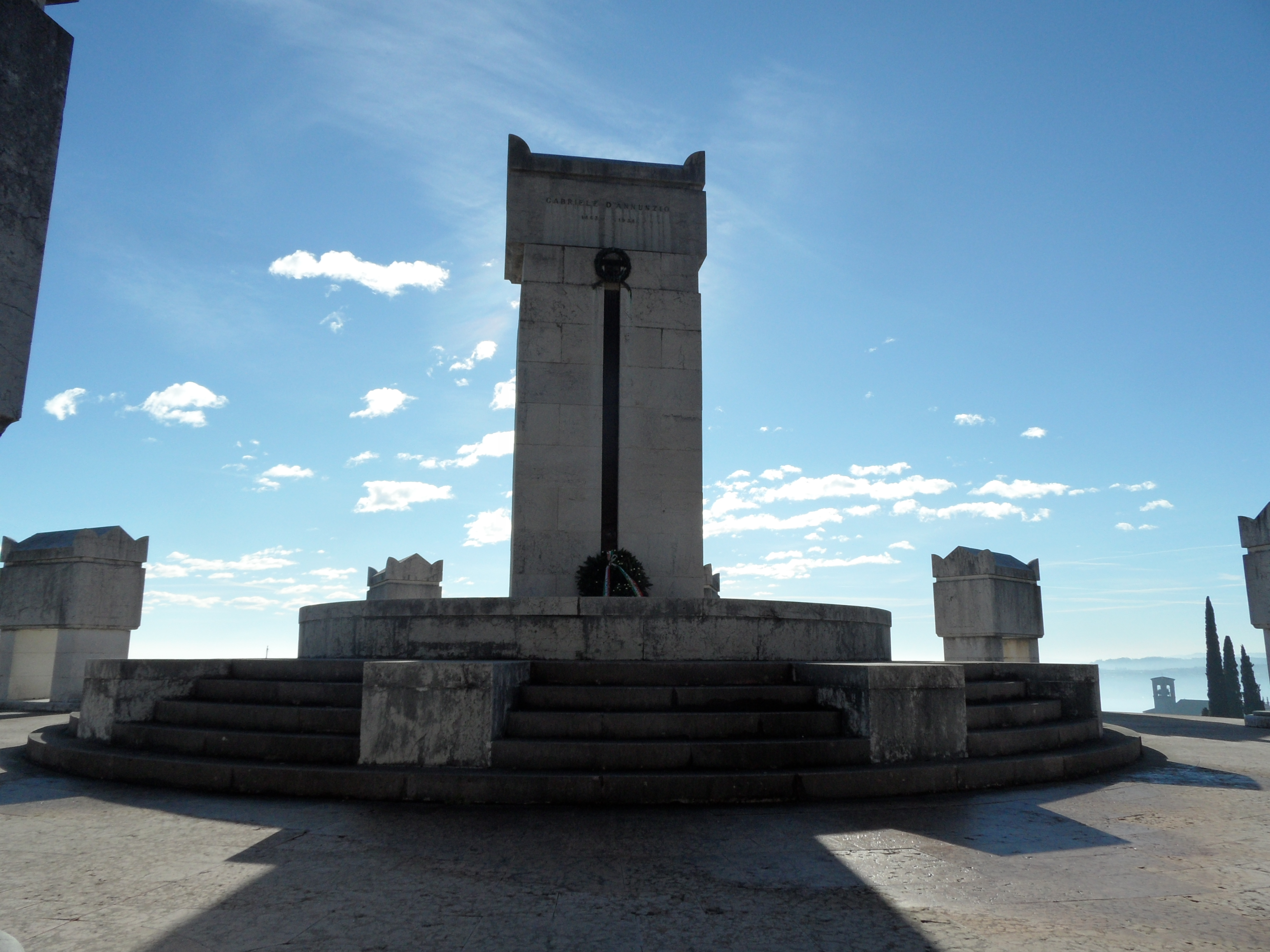 Mausoleo